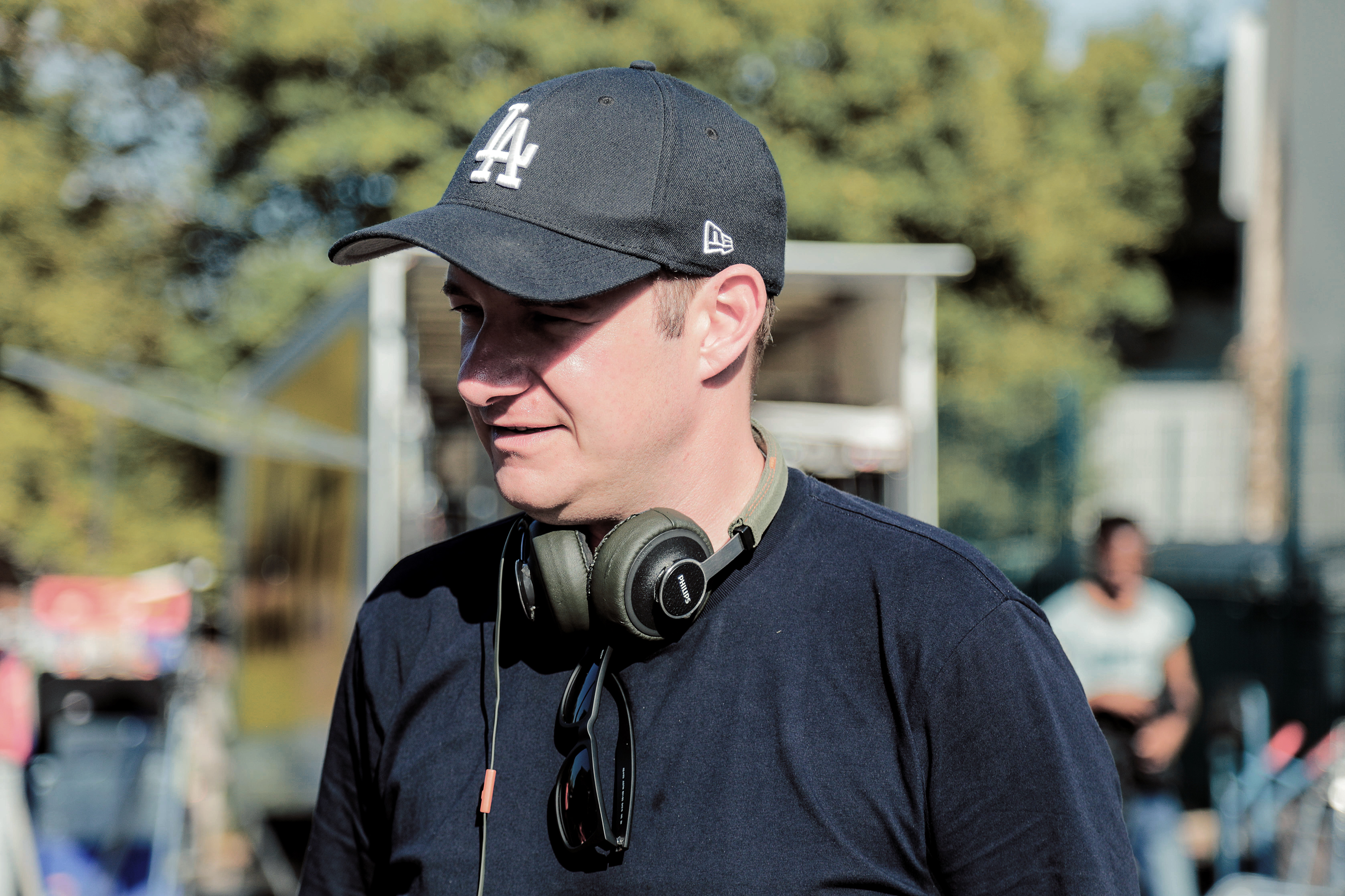 Regisseur Martin Busker am Set von "Zoros Solo"